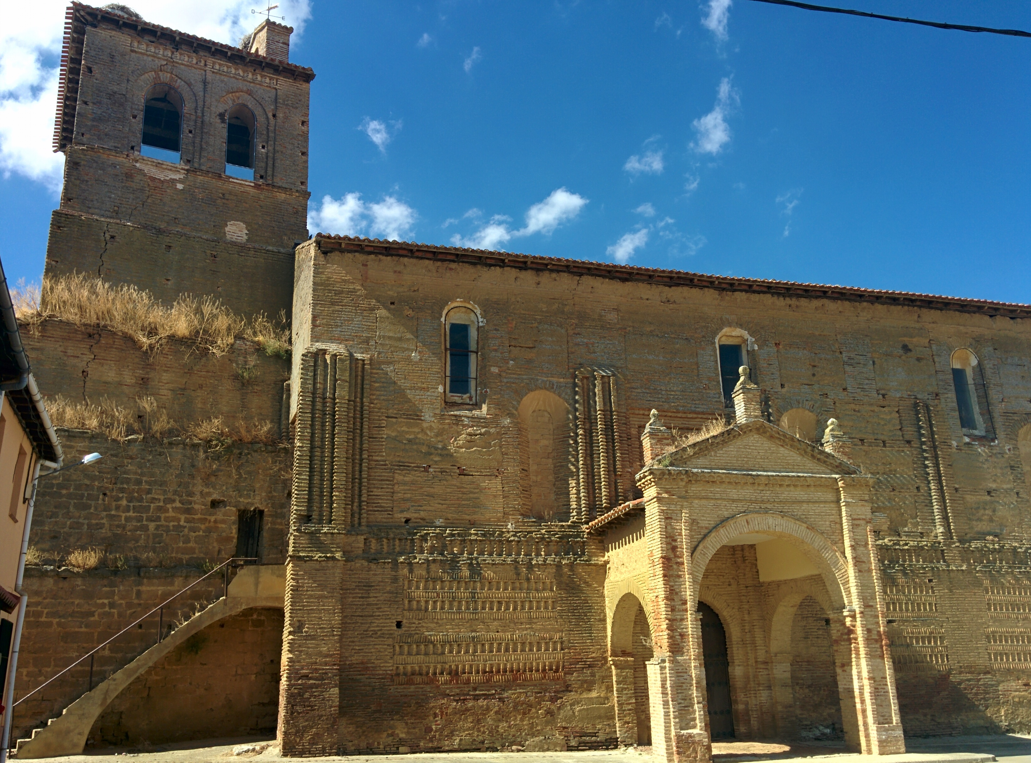 Iglesia del Salvador, en Boadilla de Rioseco (Palencia, España).